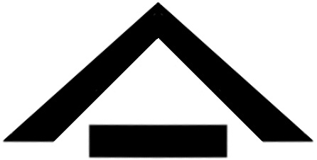 古河グループ社章。